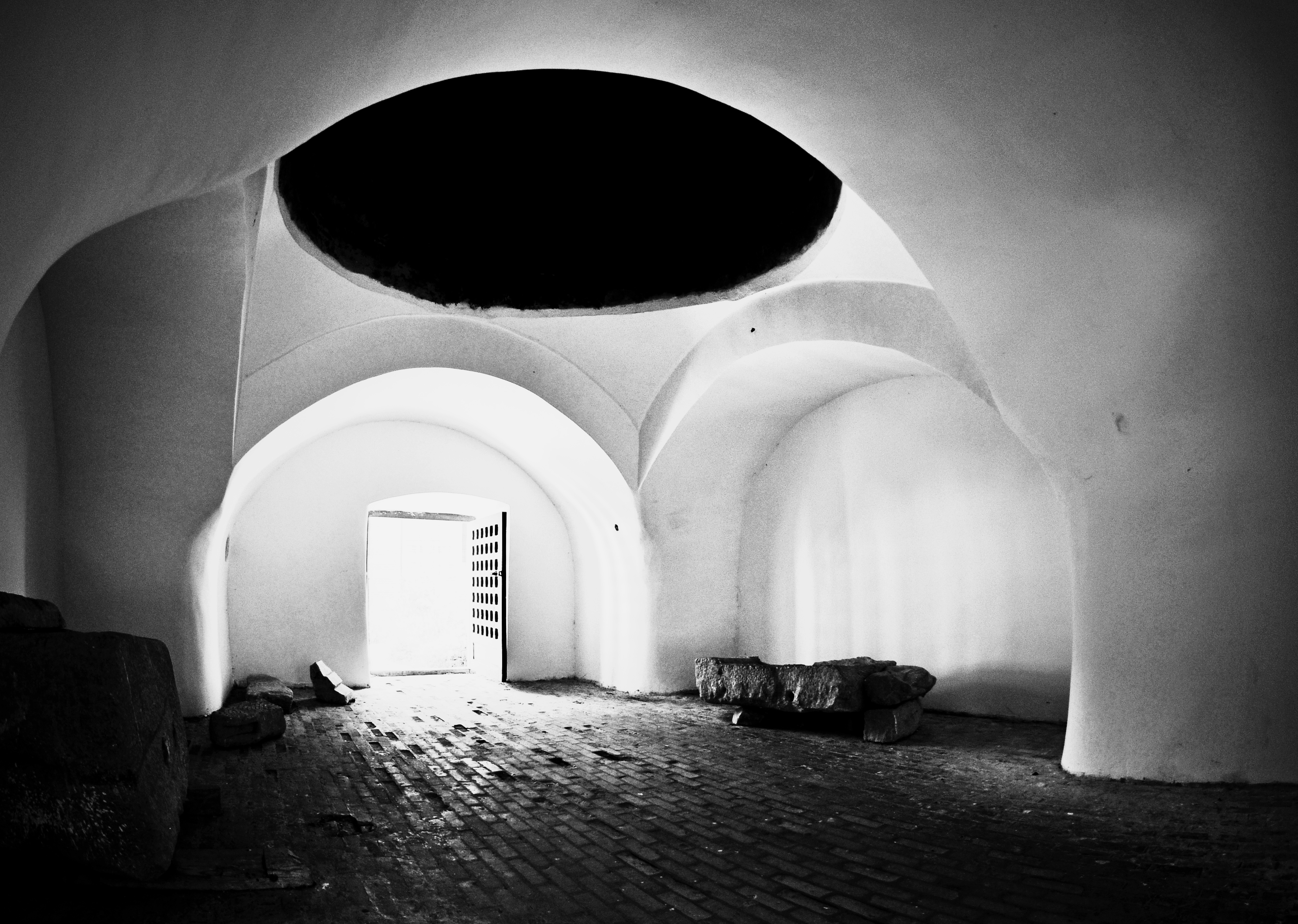 Corpul de clădiri ale incintei - laturile de nord, est, sud 06